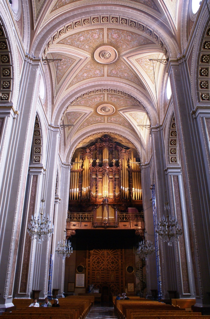 Órgano tubular ubicado en la Catedral de Morelia, Michoacán, México. Fabricado en Alemania en 1905, consta de 4600 flautas.